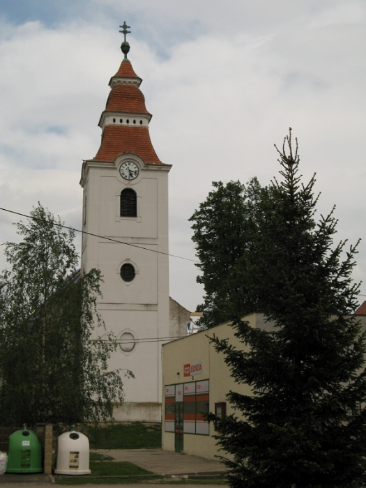 Kostel svatého Klimenta, Horní Břečkov